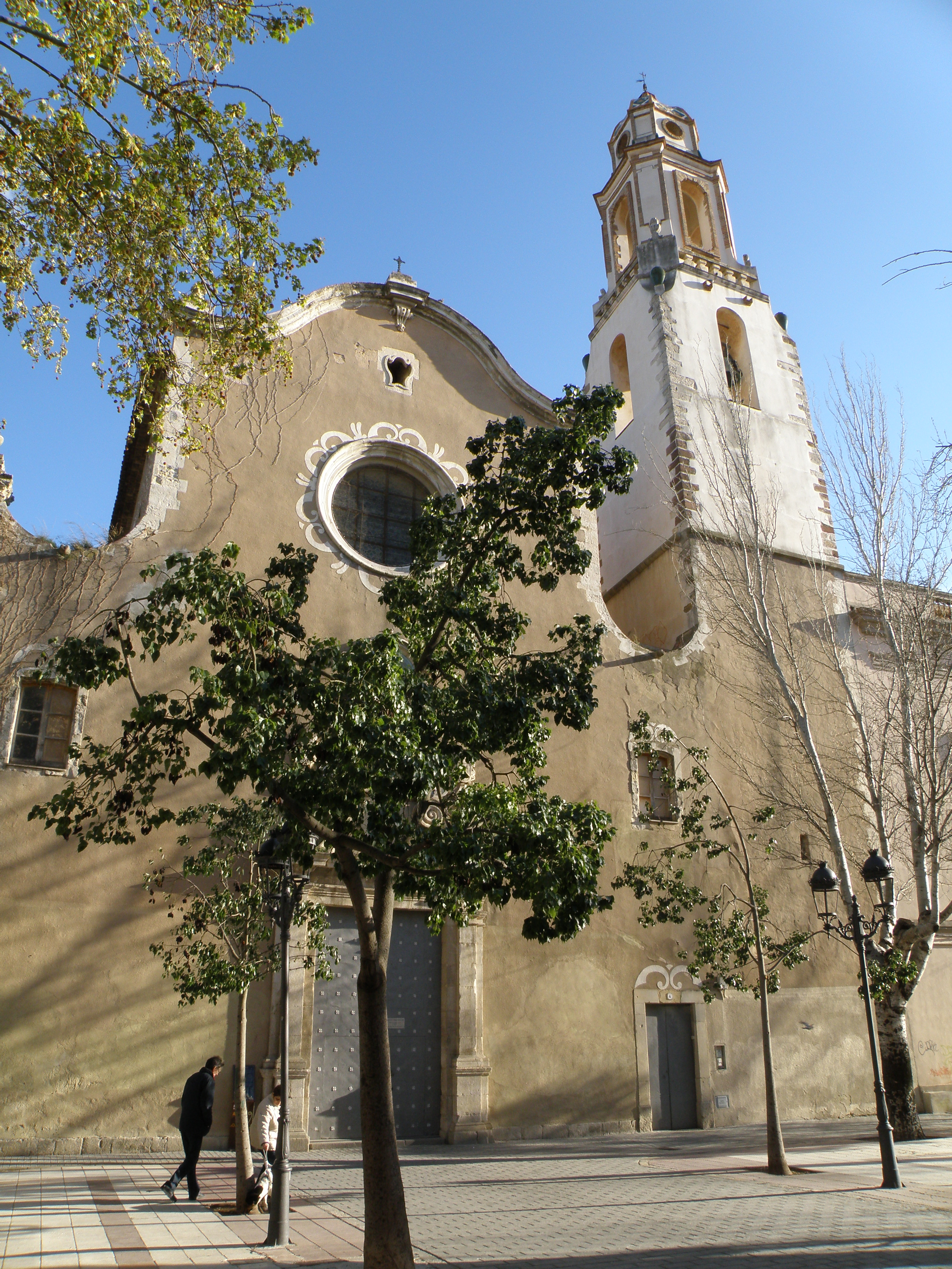 Església del Carme a Valls. Vista de la façana.